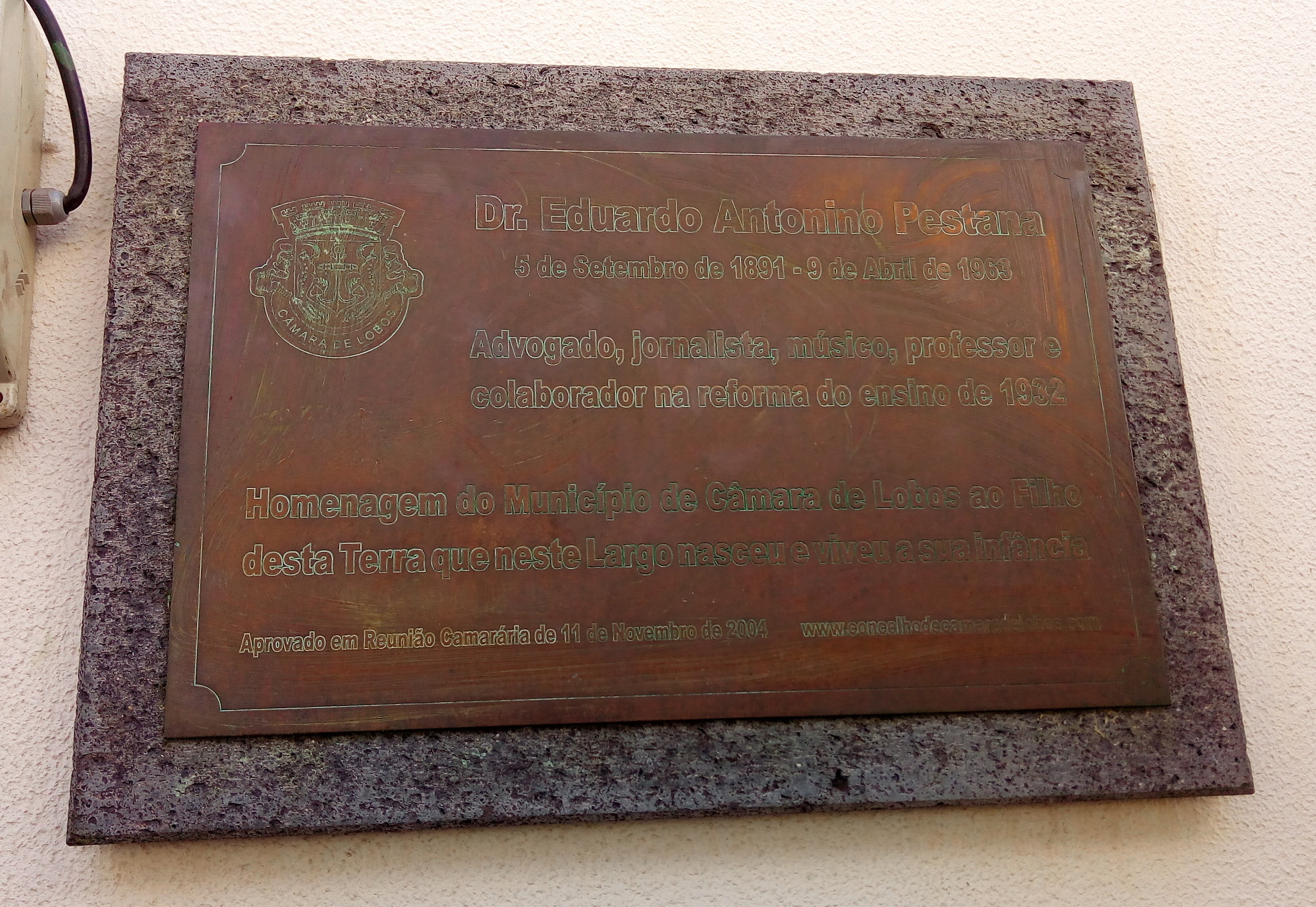 Placa de homenagem a Eduardo Antonino Pestana no Largo do Poço, Câmara de Lobos, ilha da Madeira, Portugal.